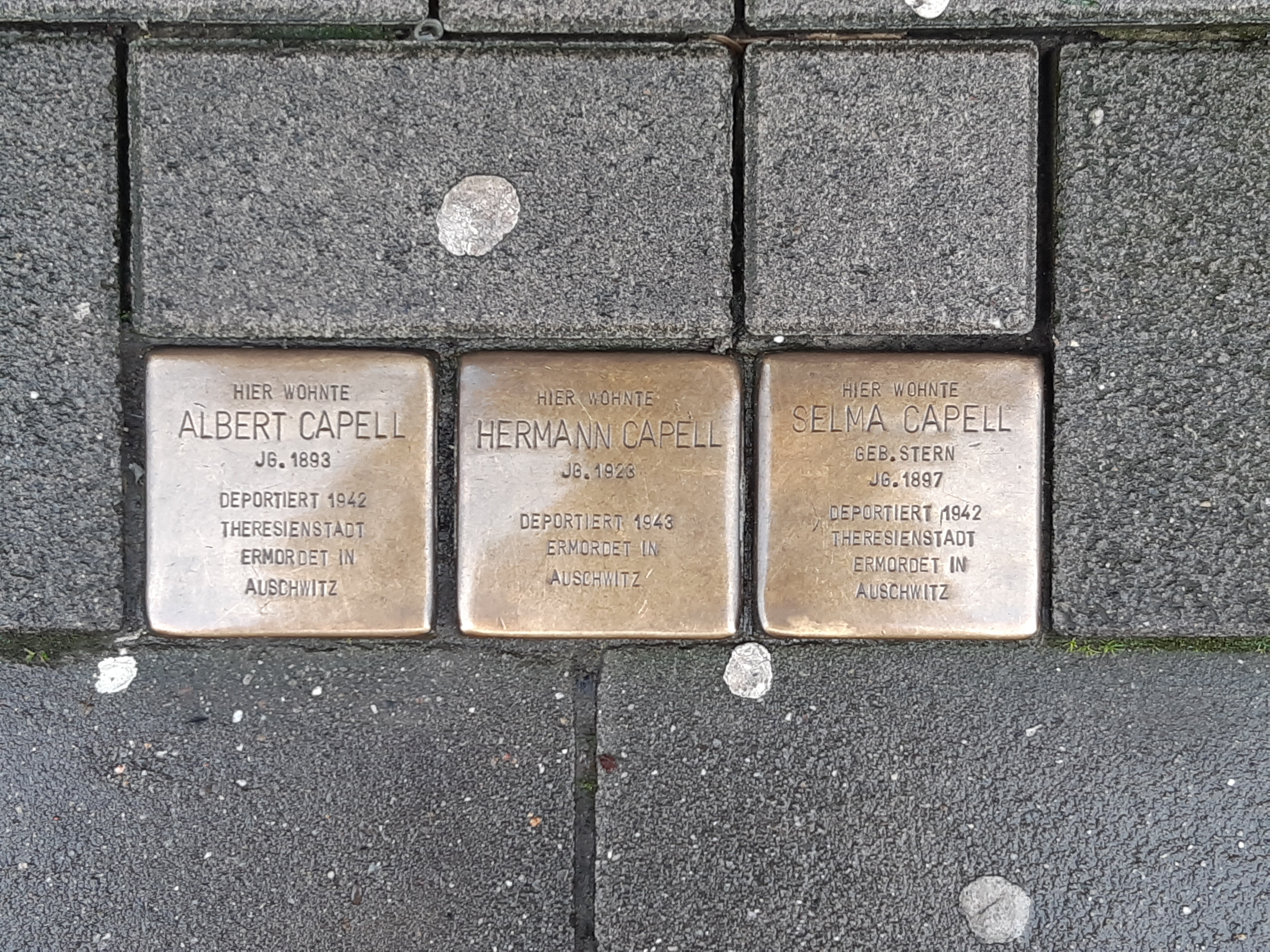 Stolpersteine für Fam. Capell in Dortmund, Haydnstr. 37